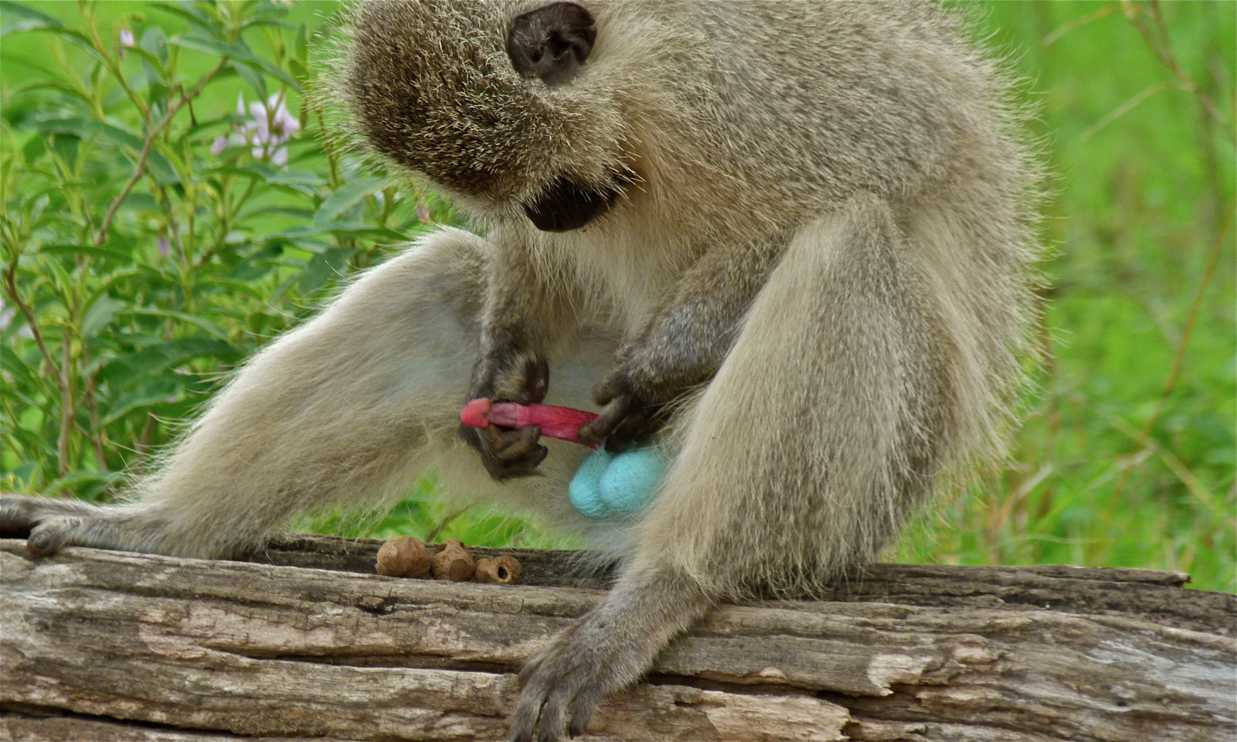 H4-1 East of Skukuza, Kruger NP, SOUTH AFRICA